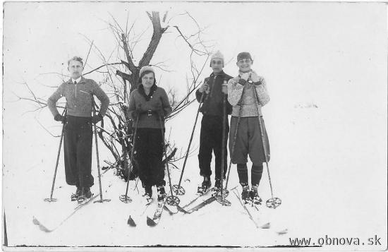 Lyžiari vo V. Tatrách v roku 1933